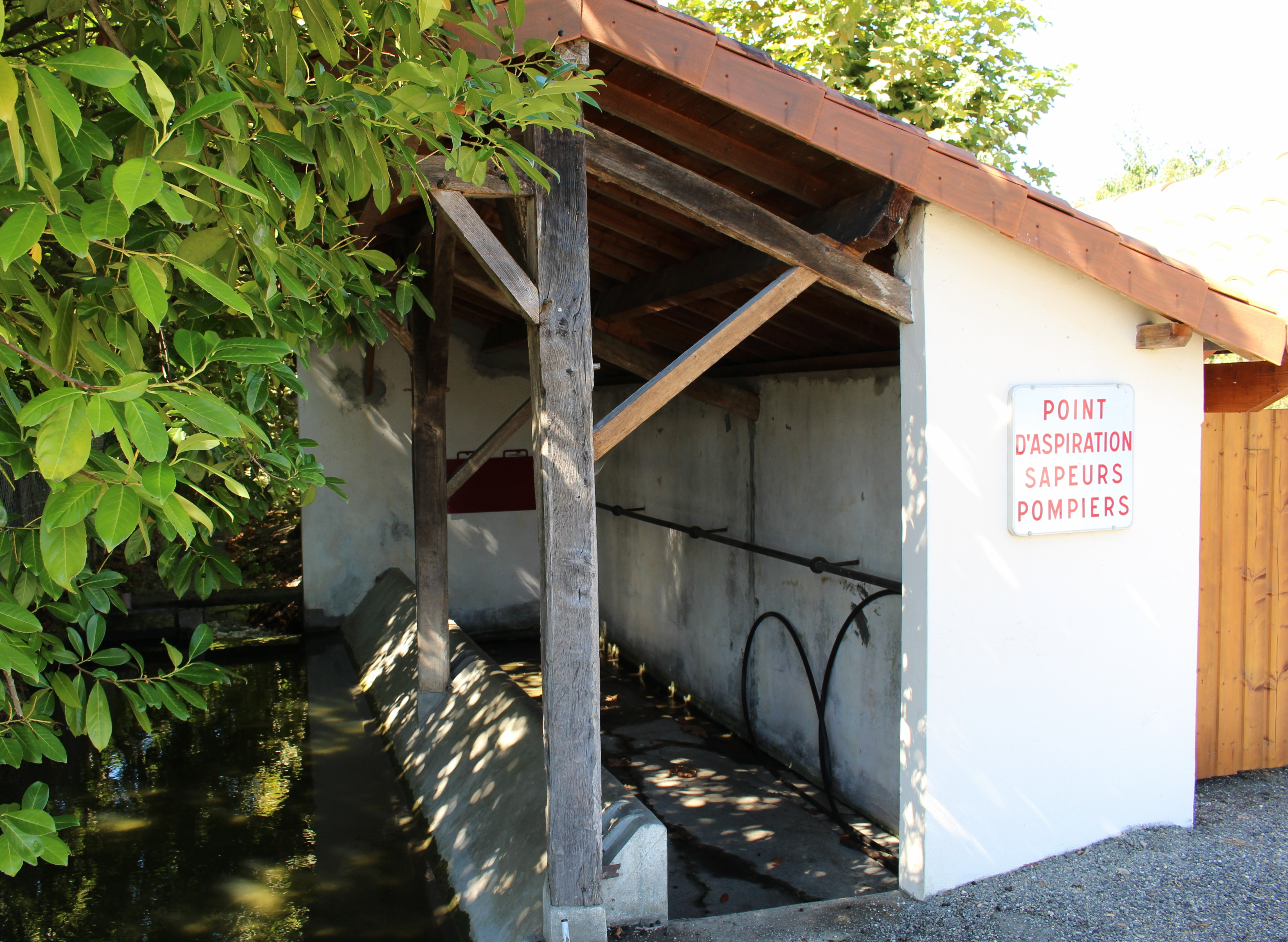 Lavoir de Gensac (Hautes-Pyrénées)